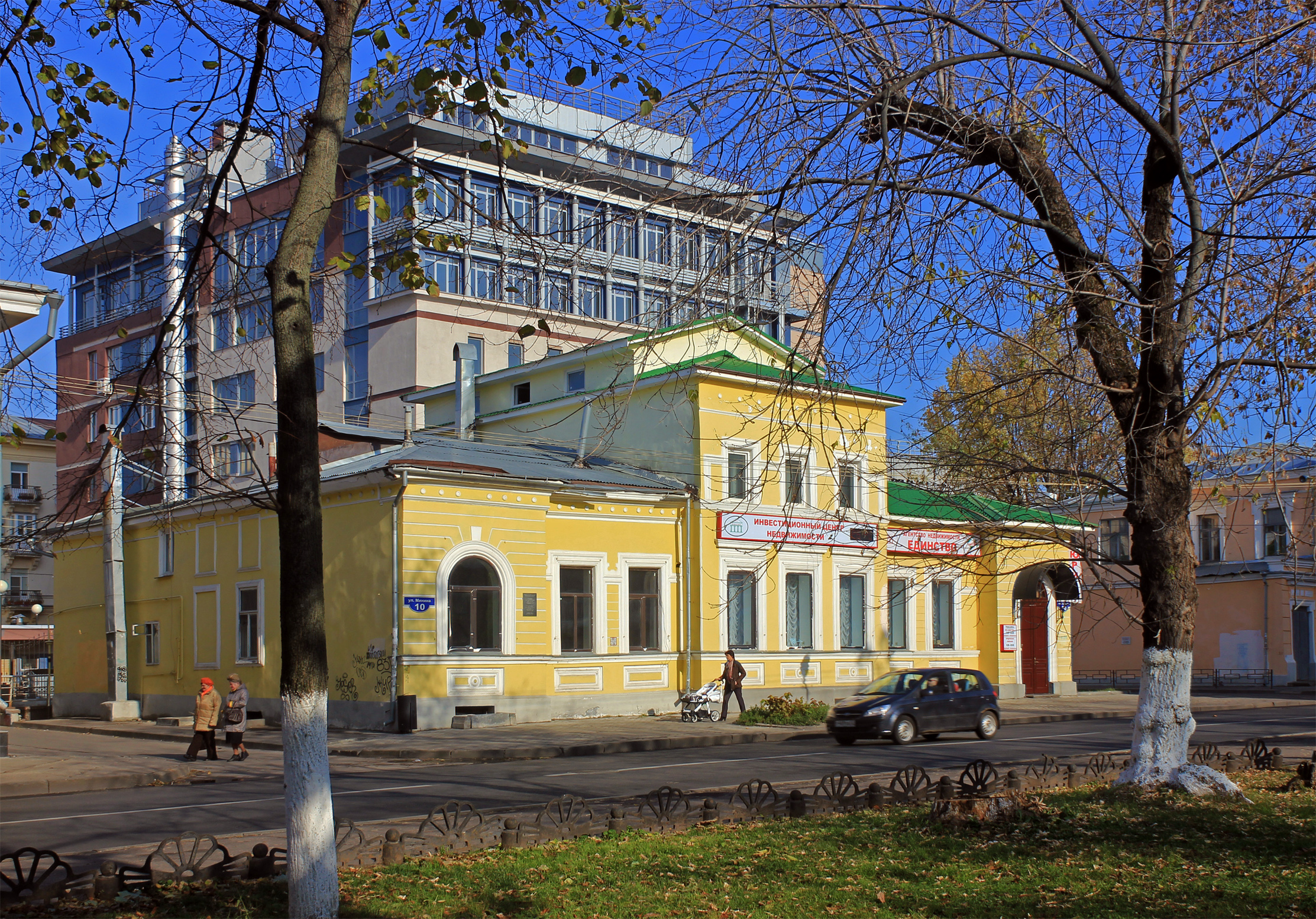 Жилой дом (Нижегородская область, Нижний Новгород, улица Минина, 10)